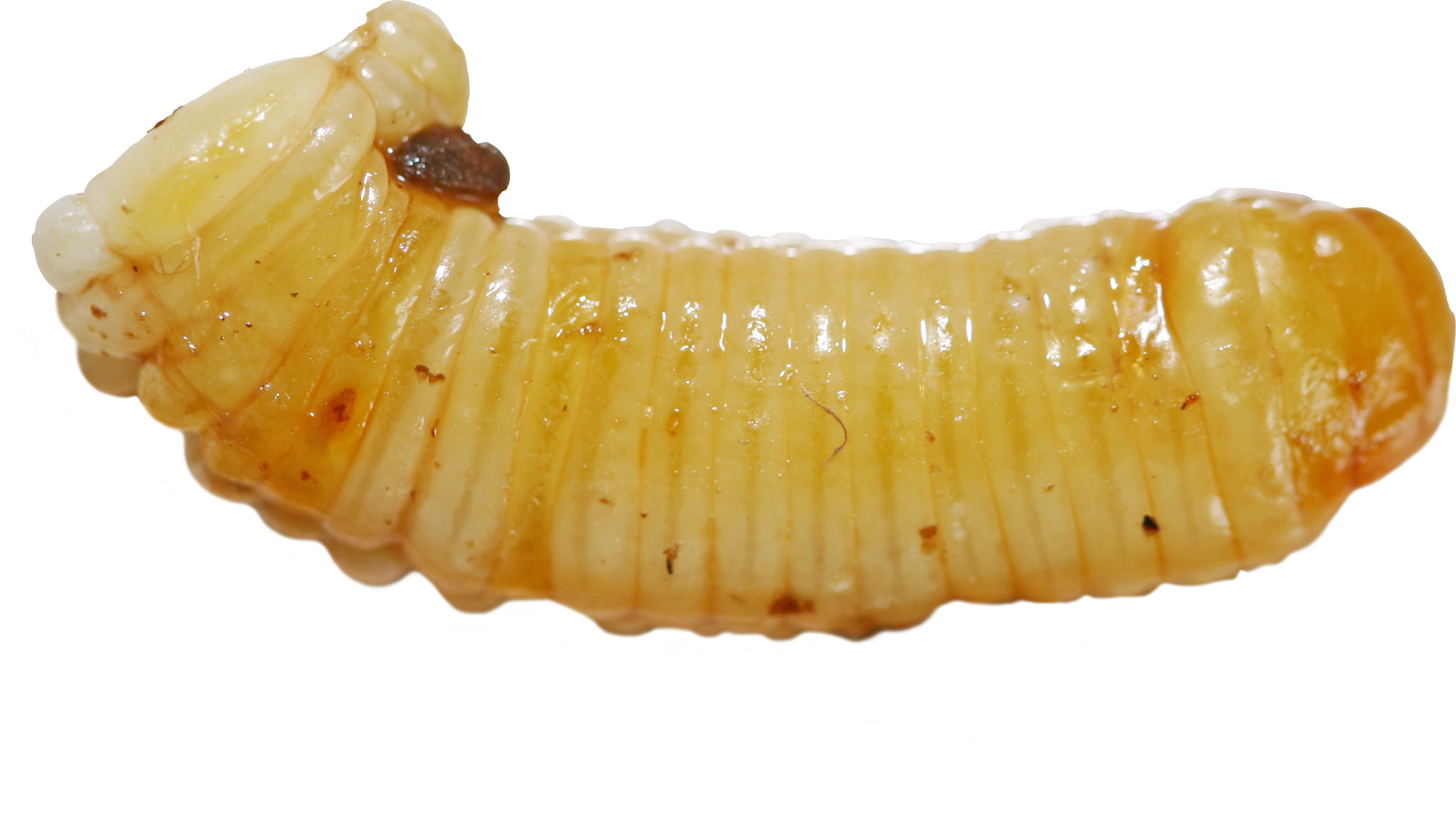 Ooteca de cucaracha